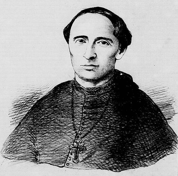 Bispo Manuel Antonio Palacios